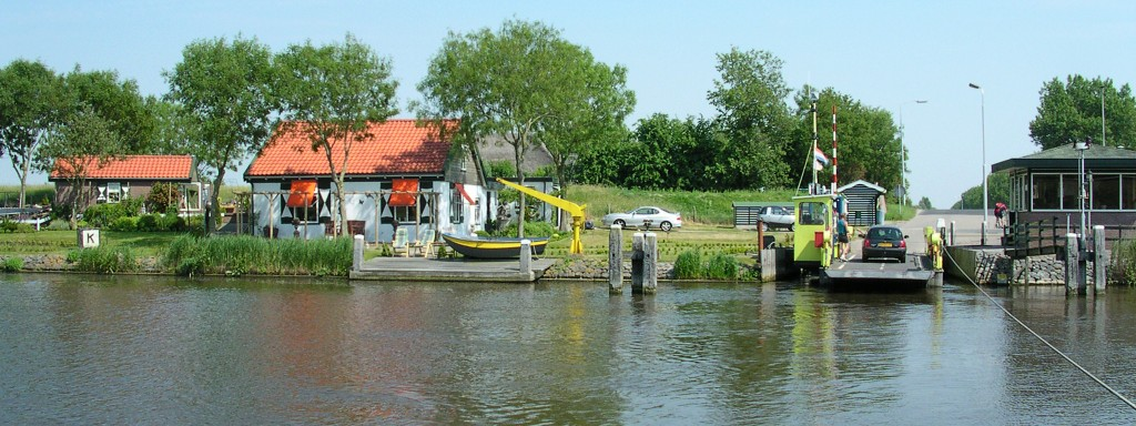 Veerpont van het buurtschap Westeinde in Anna Paulowna Ferry of the hamlet Westeinde in Anna Paulowna